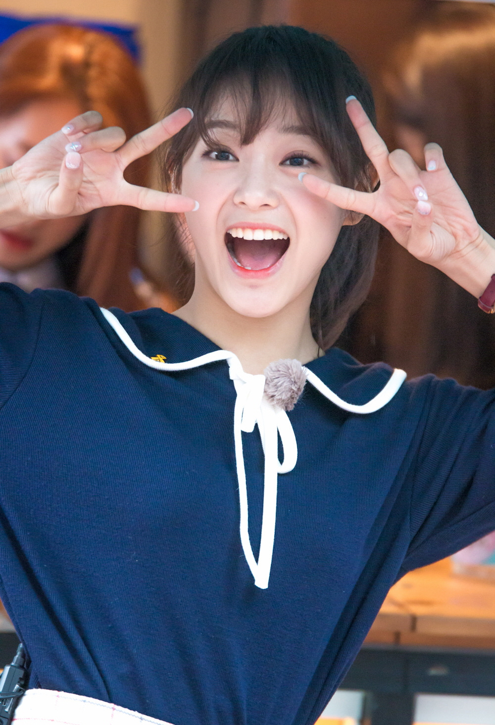 160416 IOI 게릴라 이벤트